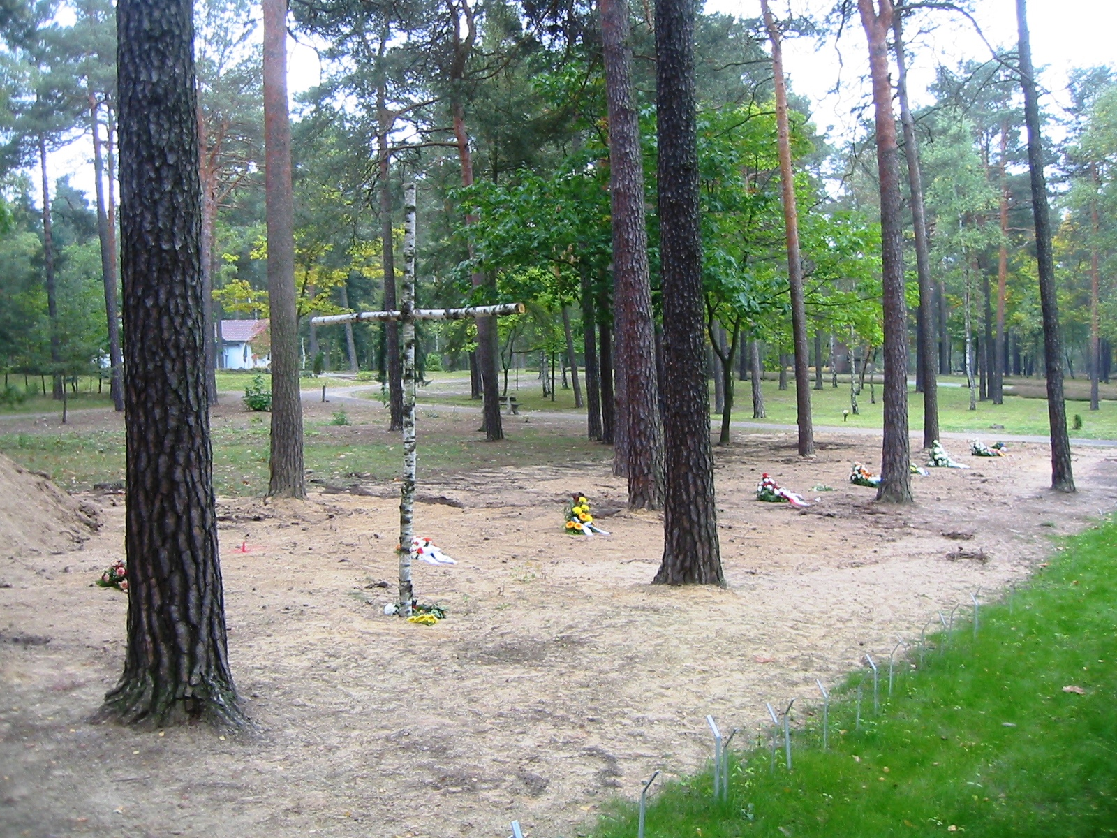 Zubettungsfläche auf dem Waldfriedhof Halbe in der Gemeinde Halbe im Landkreis Dahme-Spreewald bei Berlin. Der Friedhof ist mit über 28.000 Opfern eine der größten Kriegsgräberstätten Deutschlands.